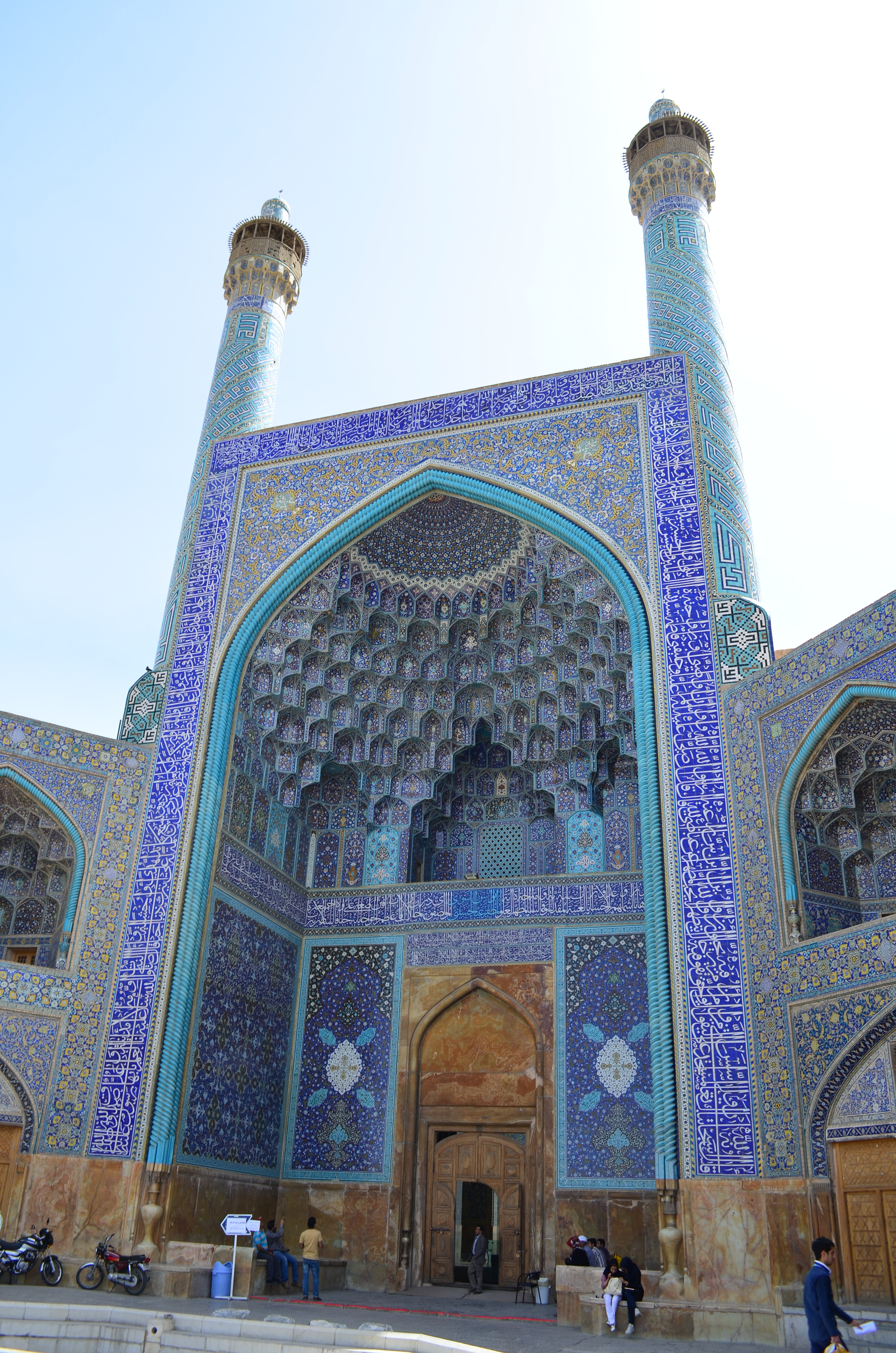 مسجد شاه، میدان نقش جهان، اصفهان، ایران